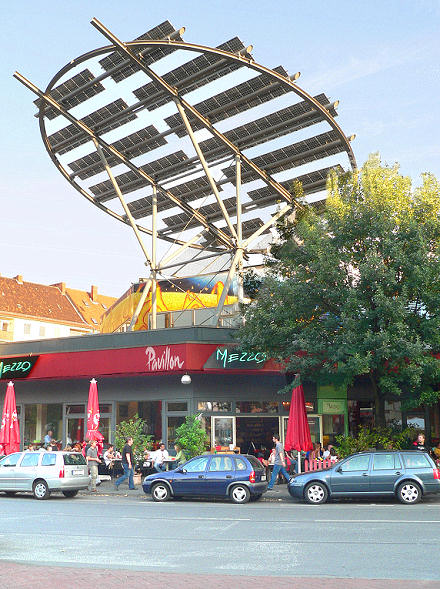 Straßenseite des Kultur- und Veranstaltungszentrums Pavillon mit Cafe Mezzo in Hannover Foto aufgenommen von Benutzer Benutzer:Axel Hindemith, September 2005